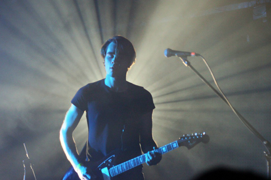 Boris Van Severen